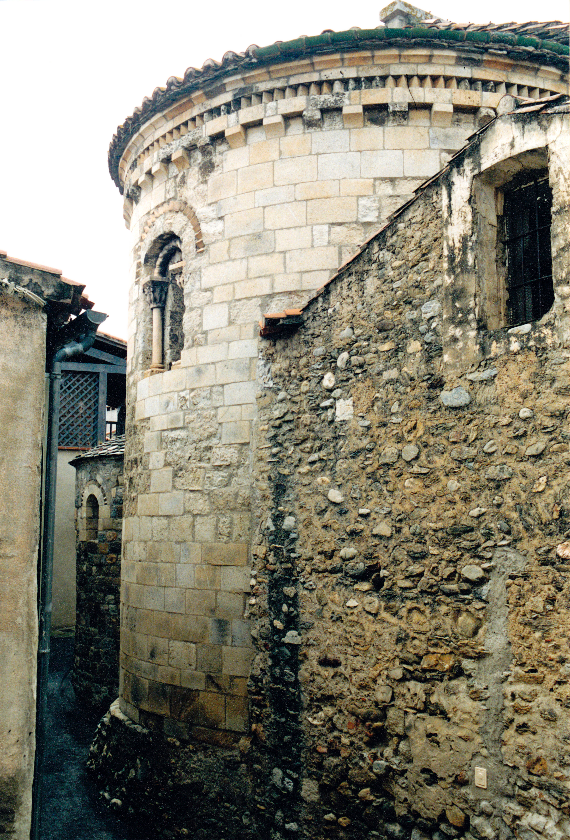 France - Pyrénées-Orientales - Église Sainte-Marie d'Espira-de-Conflent